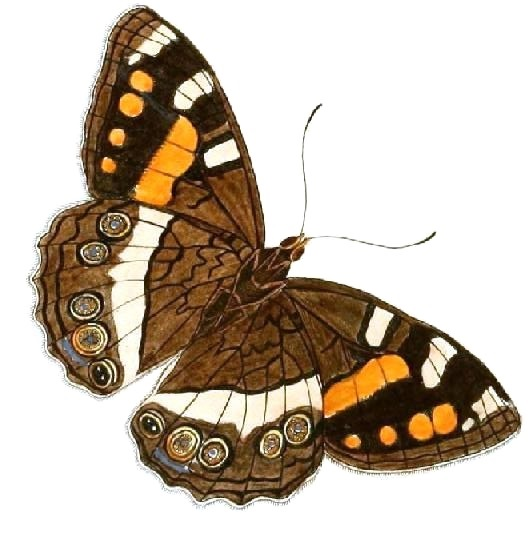 Plate III E, F: "(Papilio) Tulbaghia - (Papilio) Tulbagia" ( = Aeropetes tulbaghia, see Tree of Life